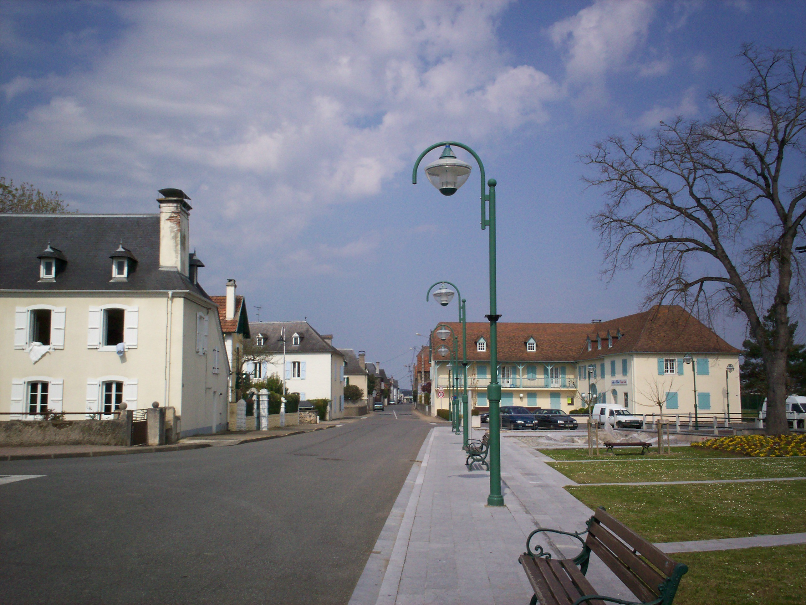 Carrera de Pardias